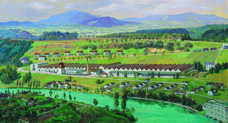 Spinnerei und Kraftwerk Felsenau, Bern, Schweiz: Grauholz und Bantiger im Hintergrund, Bauernhaus in Bremgarten im Vordergrund. Direktorenvilla der Spinnerei rechts, Elektrizitätswerk unten rechts, Wohnhäuser der beiden Arbeitersiedlungen unterhalb und oberhalb der Fabrik, auf der Felsenaustrasse das Industriegleis für die Anlieferung der Baumwolle in Bahnwagen. Ganz links das Baumwollmagazin und auf der gegenüberliegenden Strassenseite die 1903 errichtete Villa der Direktorenfamilie der Bierbrauerei Felsenau.